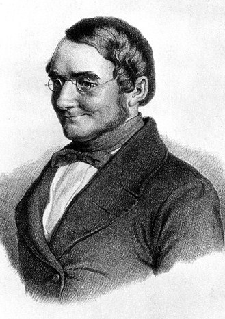 Carl A. Uhde (1792-1856), german merchant